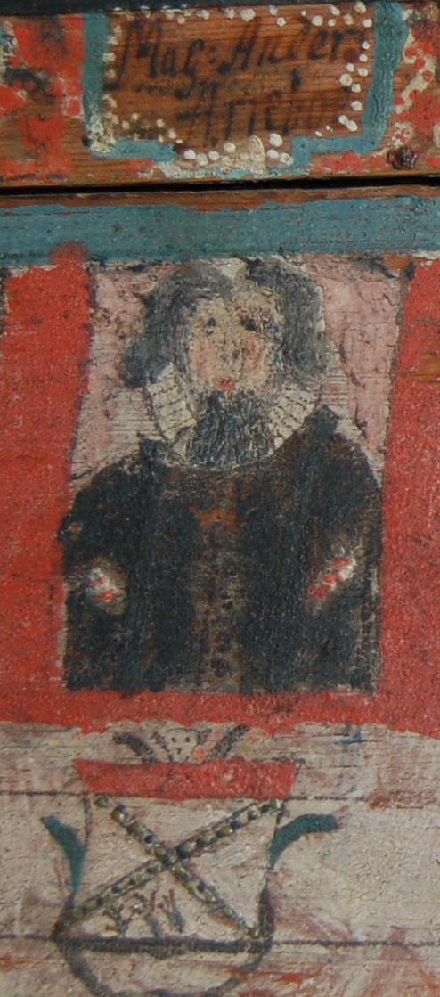 Biskop Anders Arrebo malt av Sivard Kildal i Tromsø museum